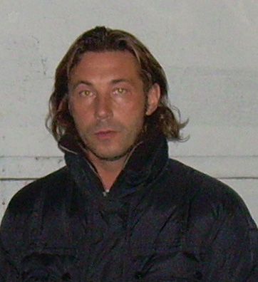 Alexander Mostovoi no partido da Selección Galega contra Camerún